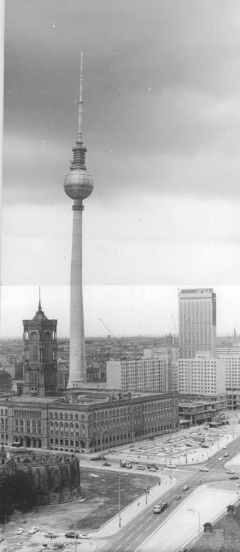 Zentralbild Mittelstädt 16.7.69 Berlin: Blick von einem der Hochhäuser am Fischerkietz auf das neue Zentrum der Hauptstadt der DDR. Vor dem Fernsehturm das Rote Rathaus; rechts der Neubau des Interhotels "Stadt Berlin" und Neubauten im Stadtzentrum. Hochpanorama